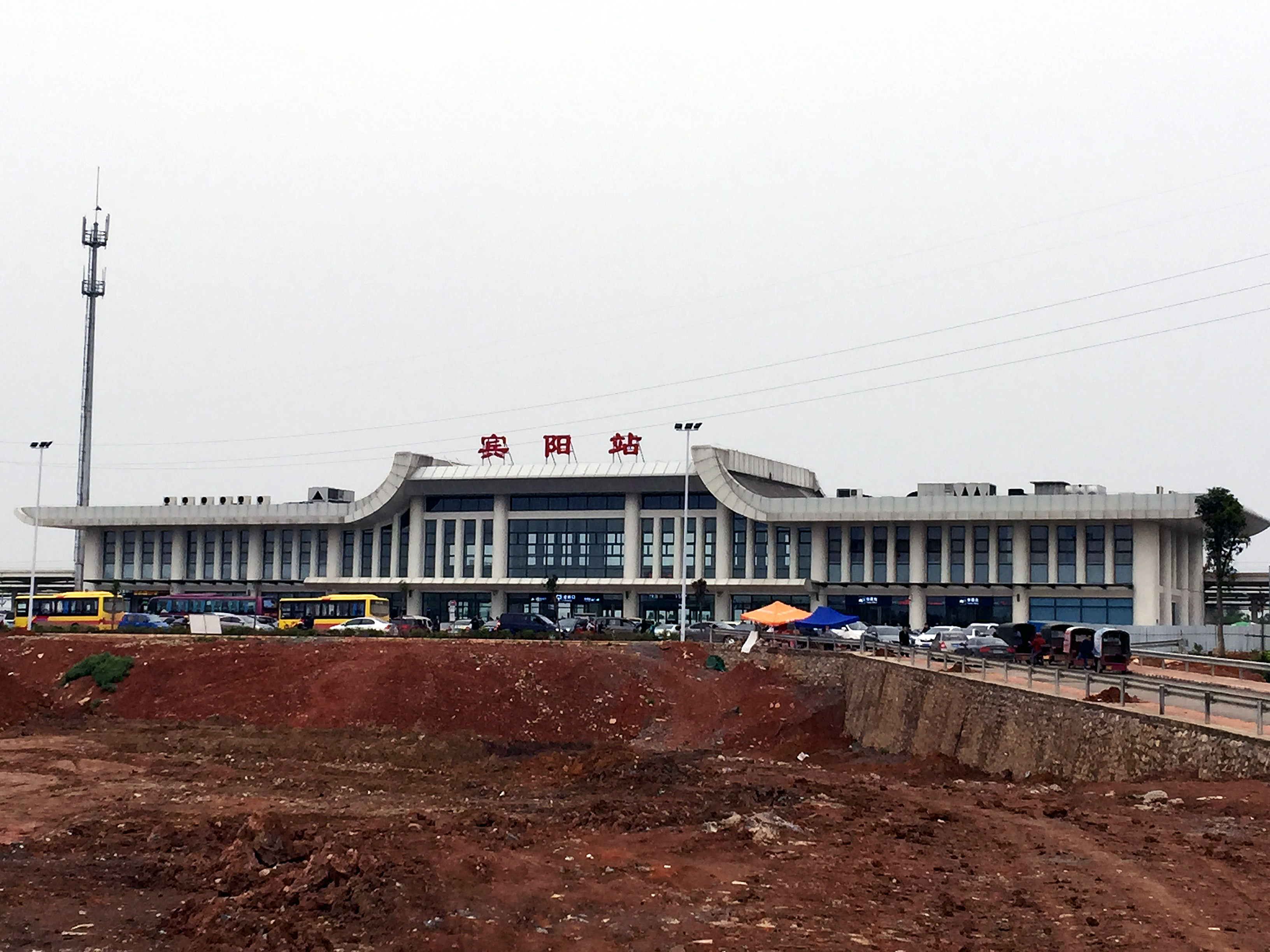 中国铁路宾阳站外观